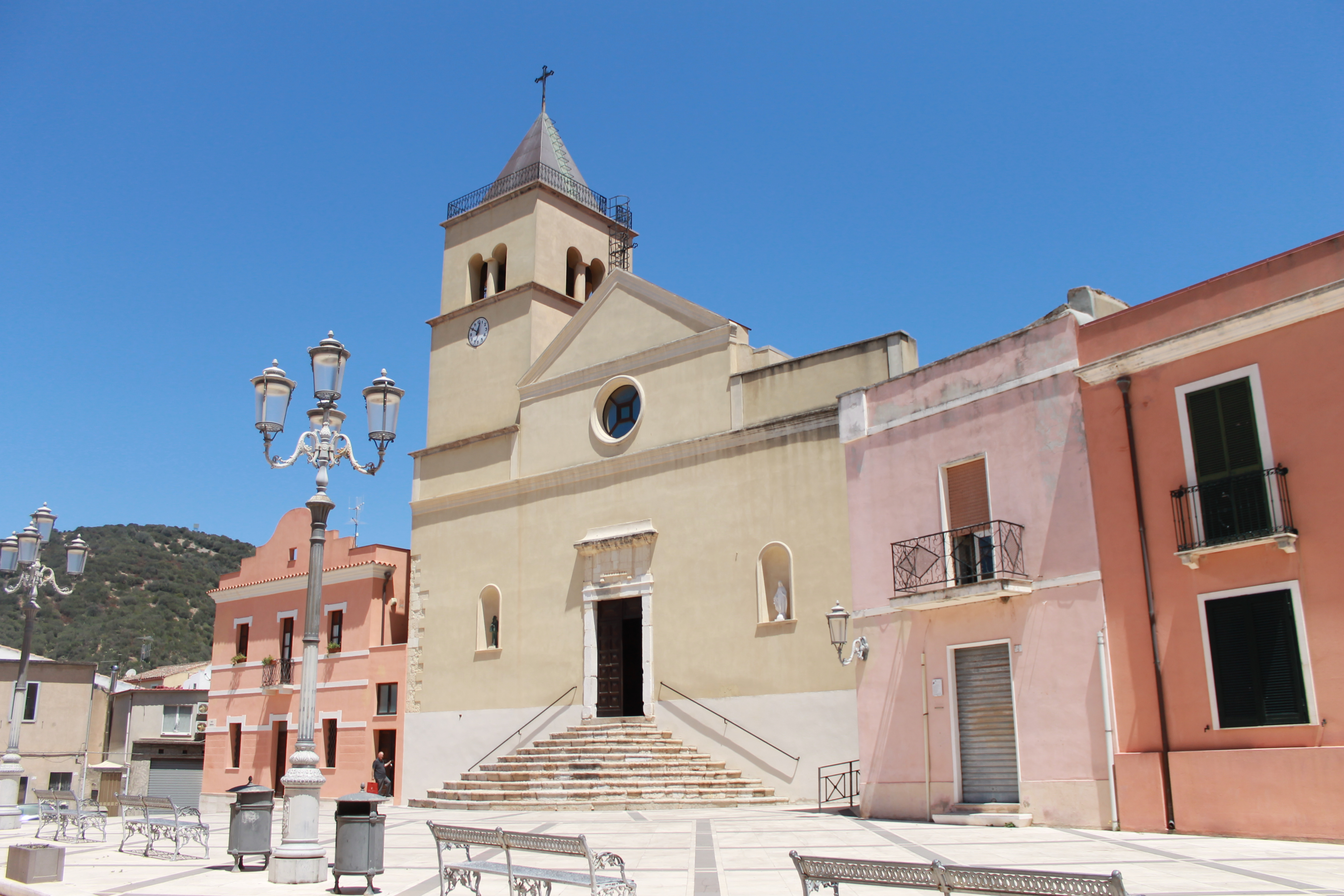 Chiesa parrocchiale della Vergine del Carmine e piazzale di chiesa a Teulada.